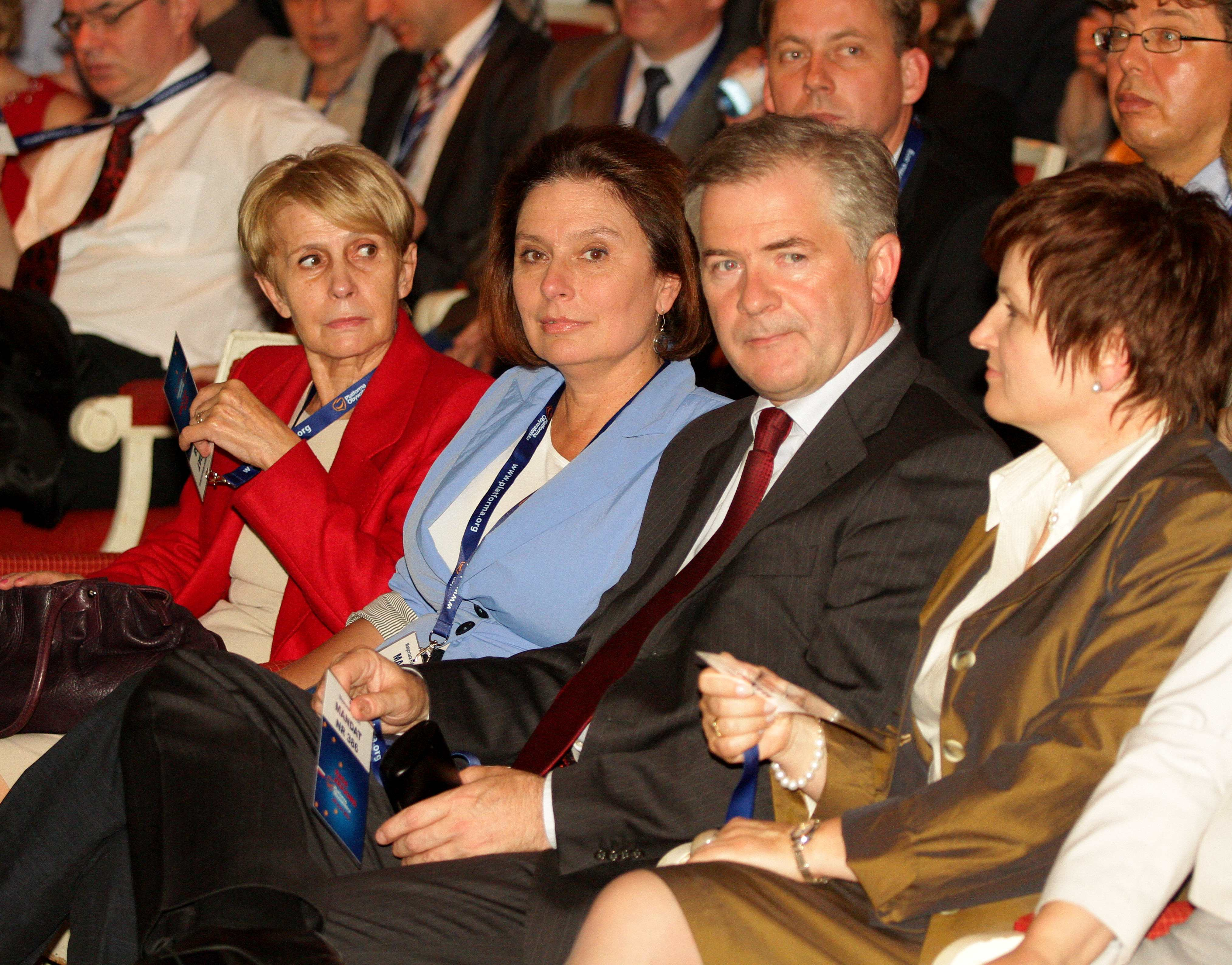 Rada Krajowa PO